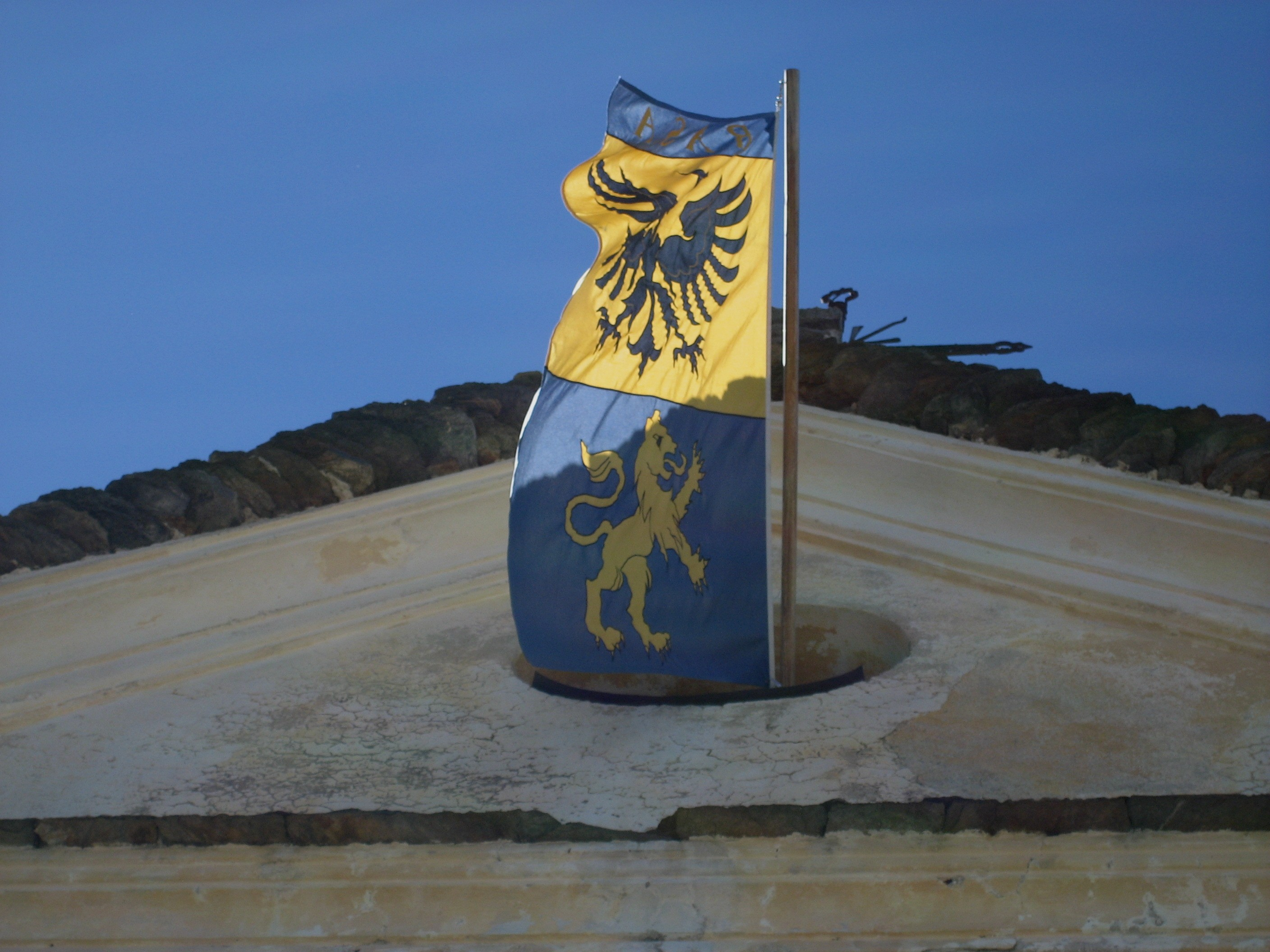 Fahne mit dem Wappen von Rasa, die jeweils anlässlich des St. Anna-Festes im Juli bei der Kirche ausgehängt wird.